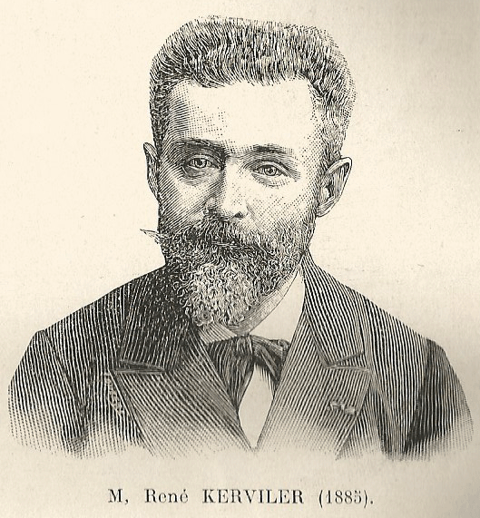 Kerviler 1885